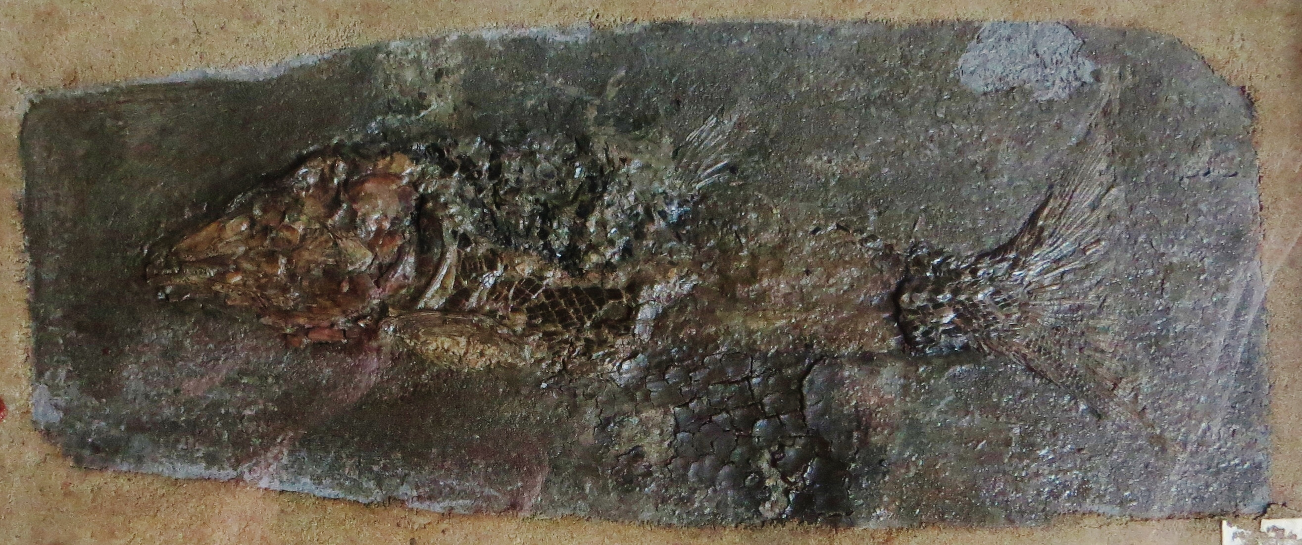 Fossil of Eugnathus, an extinct fish - Took the picture at Teylers Museum, Haarlem